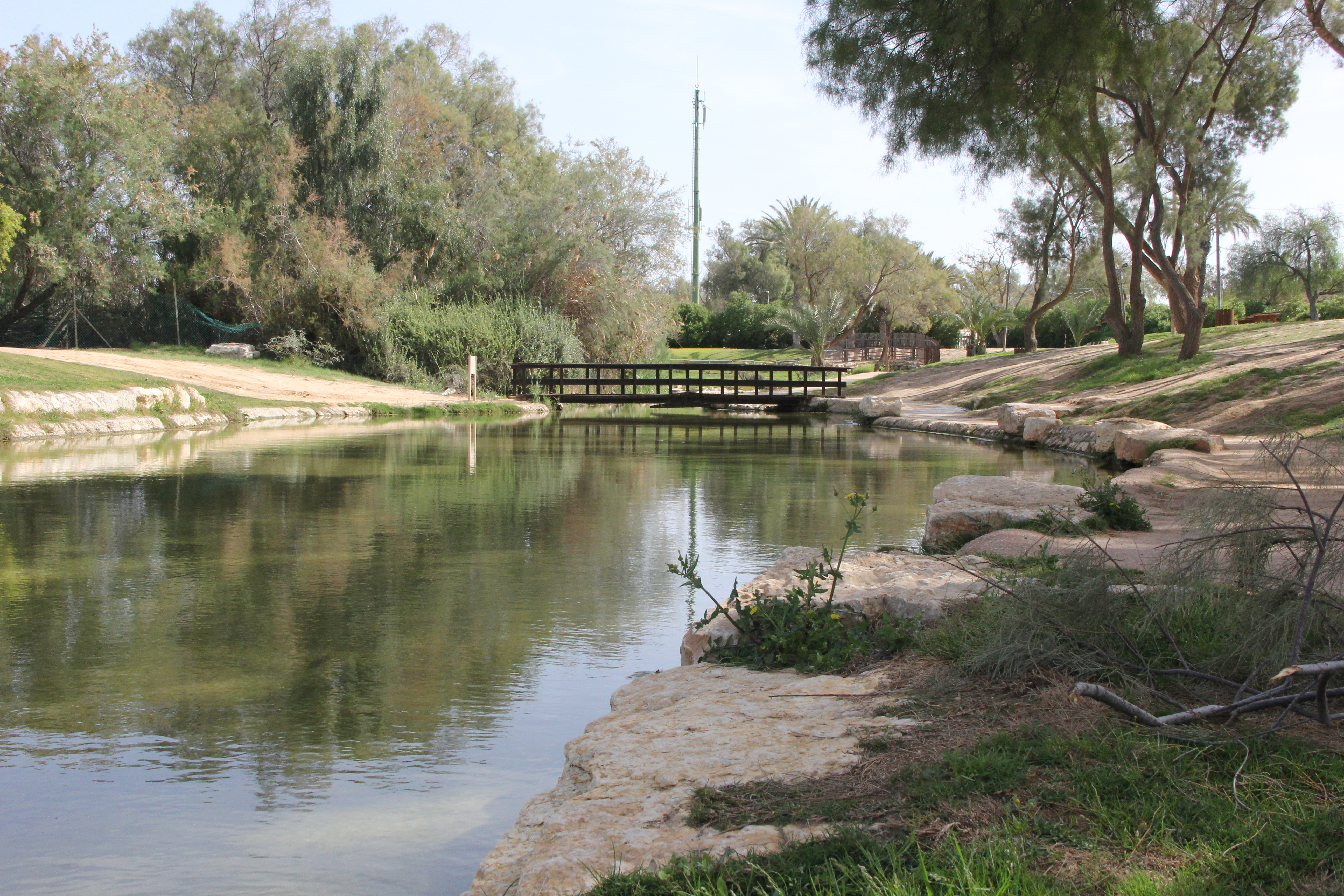 גן לאומי אשכול הידוע גם בשמות פארק אשכול וגן לאומי הבשור, נמצא בנגב הצפוני, ליד כביש 241, בין צומת אורים לצומת מעון, ממזרח לערוצו של נחל הבשור. שטחו של הגן הוא כ-3,000 דונם. זהו גן לאומי אשר הוקם על ידי הקרן הקיימת ומוחזק על ידי רשות הטבע והגנים. הגן נקרא על שמו של לוי אשכול, ראש הממשלה של ישראל בשנות השישים. למרות היותו מקושר למועצה אזורית אשכול בשל שמו ובשל קרבתו הגאוגרפית למועצה אזורית זו, נמצא הגן בשטח המוניציפלי של מועצה אזורית מרחבים אשר הייתה גם שותפה להקמת הפארק.